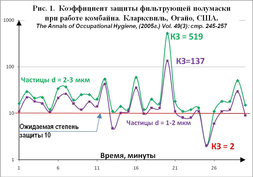 Файл содержит график, полученый при непрерывном измерении коэффициента защиты респиратора (фильтрующей полумаски) в реальном масштабе времени при его использовании обычным рабочим.